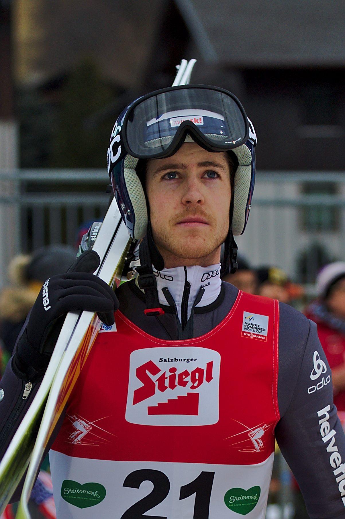 FIS Worldcup Nordic Combined Ramsau 2016. Bild zeigt Tim Hug (SUI)